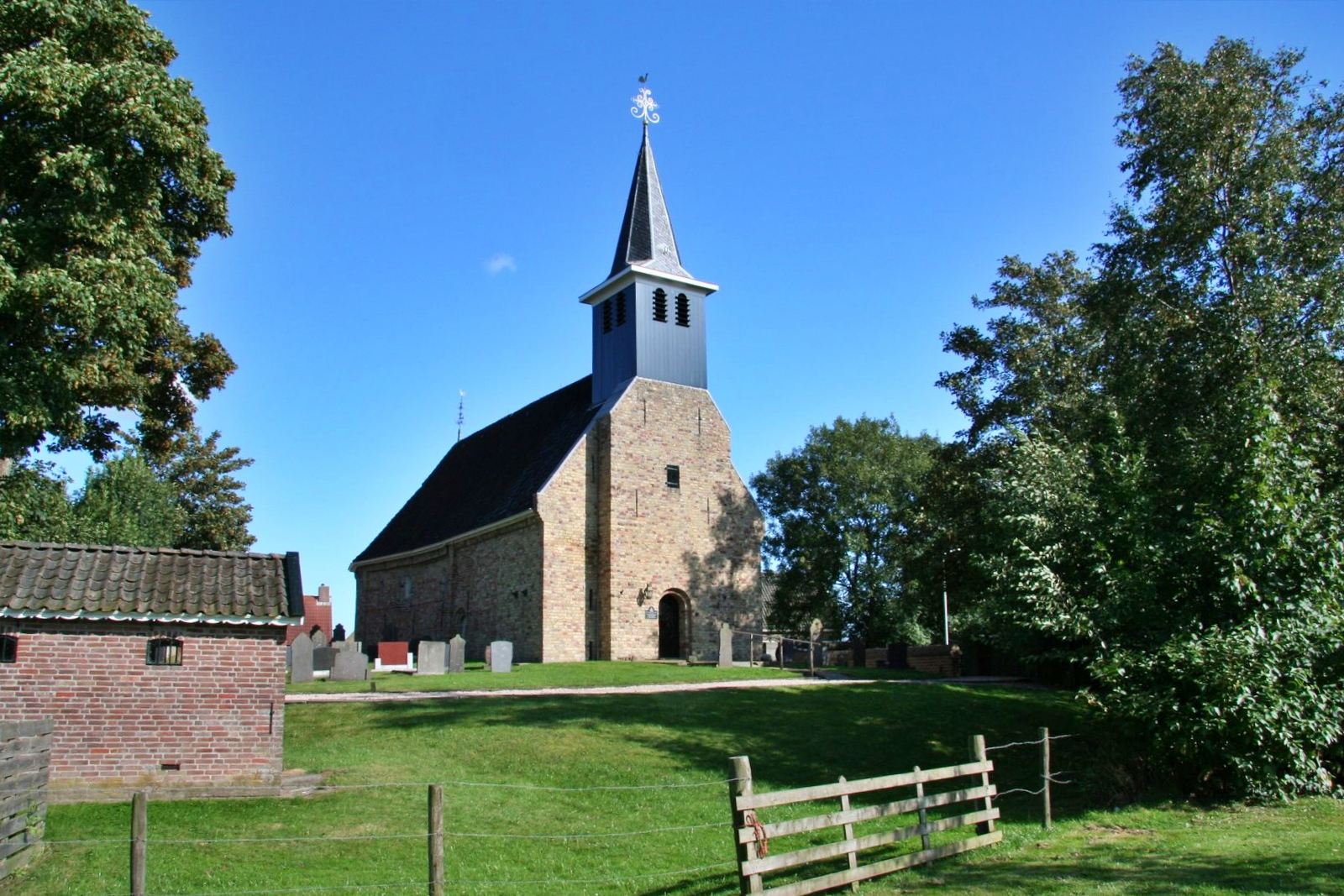 Kerkje van Exmorra